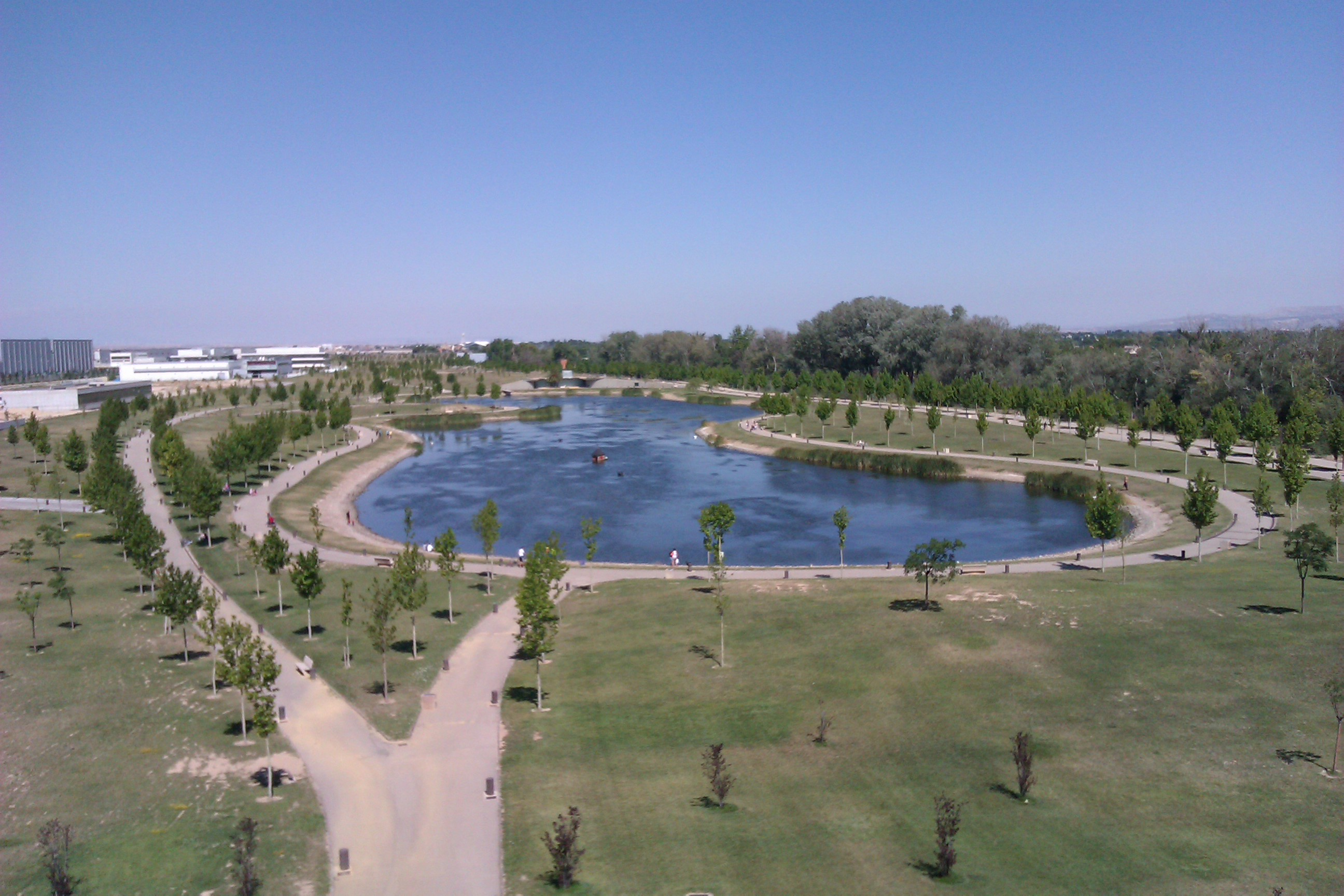 PlaZa park, Zaragoza